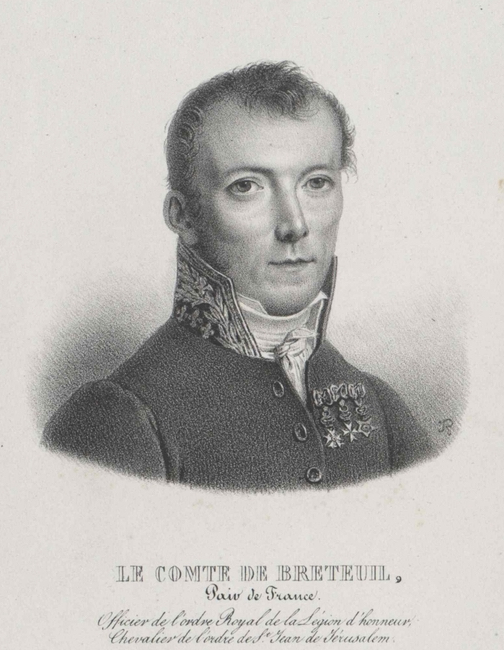 Achille-Charles-Stanislas-Emile de Breteuil (1781-1864)